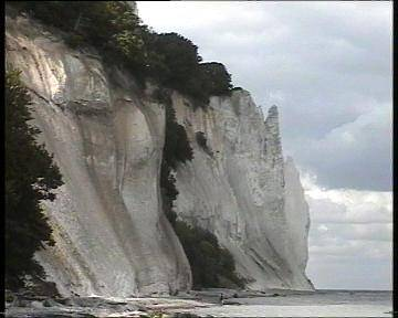 Møns Klint (en danois : « les falaises de Møn ») sont une série de falaises situées sur la côte est de l'île danoise de Møn.A près de 128 mètres d’altitude, elles surplombent la mer Baltique depuis 70 millions d’années et sont principalement formées de coquillages préhistoriques. Sur une longueur de 7 kilomètres, le mouvements de glaciers en provenance du Nord ont poussé le plancher océanique vers le sud-ouest. Des millions de mètres cubes de restes de crustacés ont été repoussés, formant des plis et des bosses émergeant ainsi de la surface de l’océan. C’est à la fin de la dernière ère glaciaire, il y a environ 11000 ans, à la fonte des glaces, que les falaises d’aujourd’hui sont apparues (wikipedia).